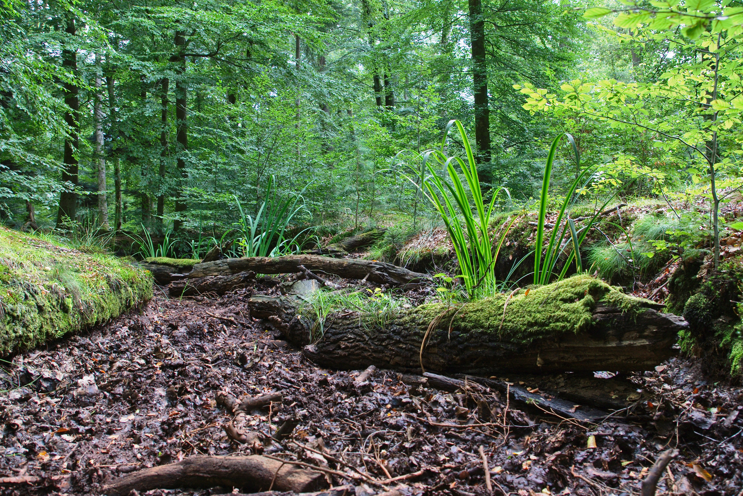 Trockengefallener Heilbach im Bienwald (August 2016).